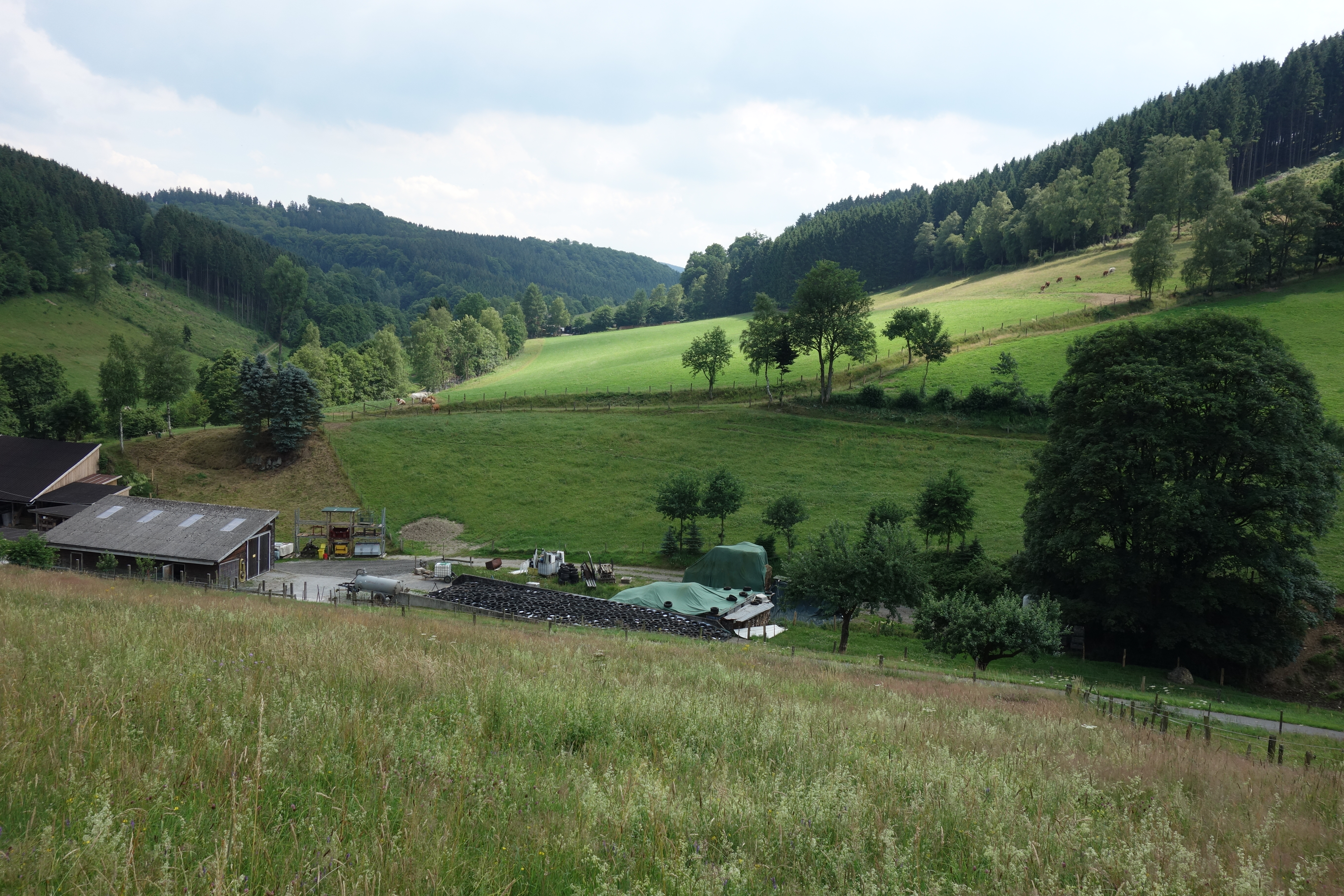 Günland gehört zum Landschaftsschutzgebiet Offenlandschaftskomplex Elpe; südwestliche LSG-Teilfläche südlich Elpe. Wald gehört zu zwei anderen Landschaftsschutzgebieten